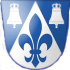 Česky: znak obce Stříbrnice